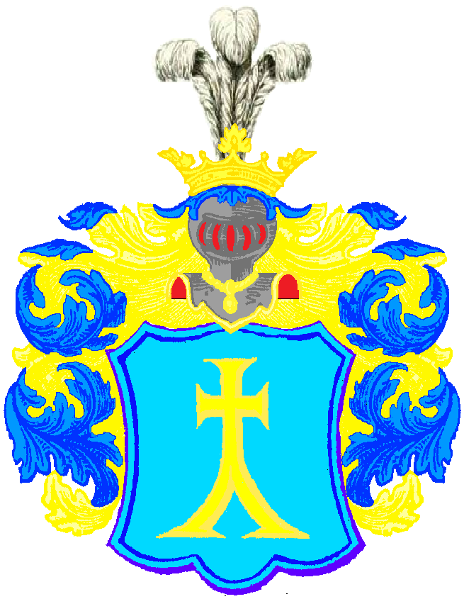 Герб роду "Васькевич"